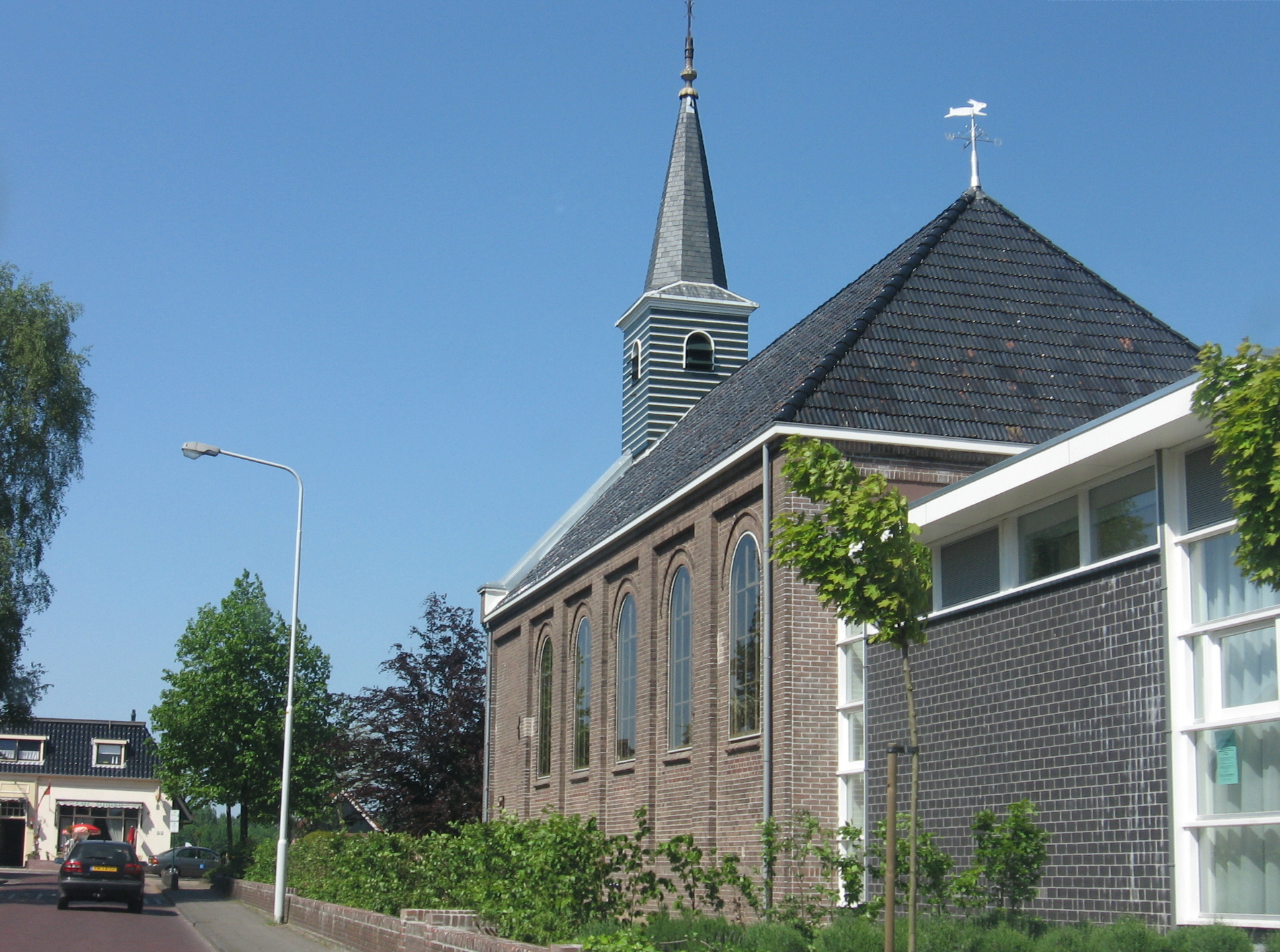 Oudehaske